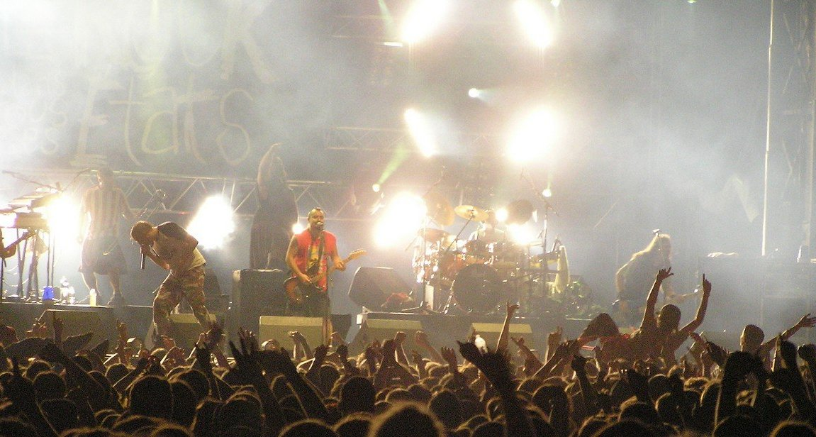 SKA-P at Rock Dans Tous Ses Etats, Evreux, France